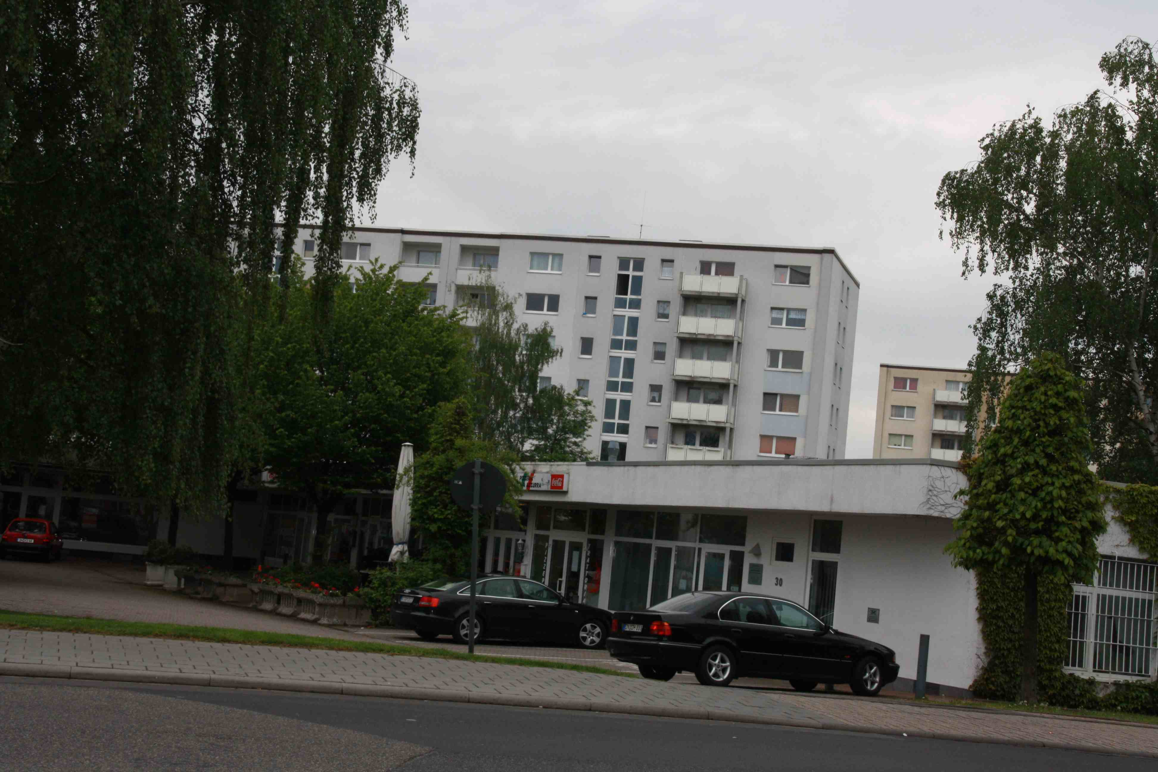 Die sog. Satelittenstadt in Düren